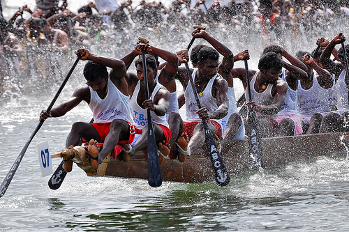 വള്ളം കളി